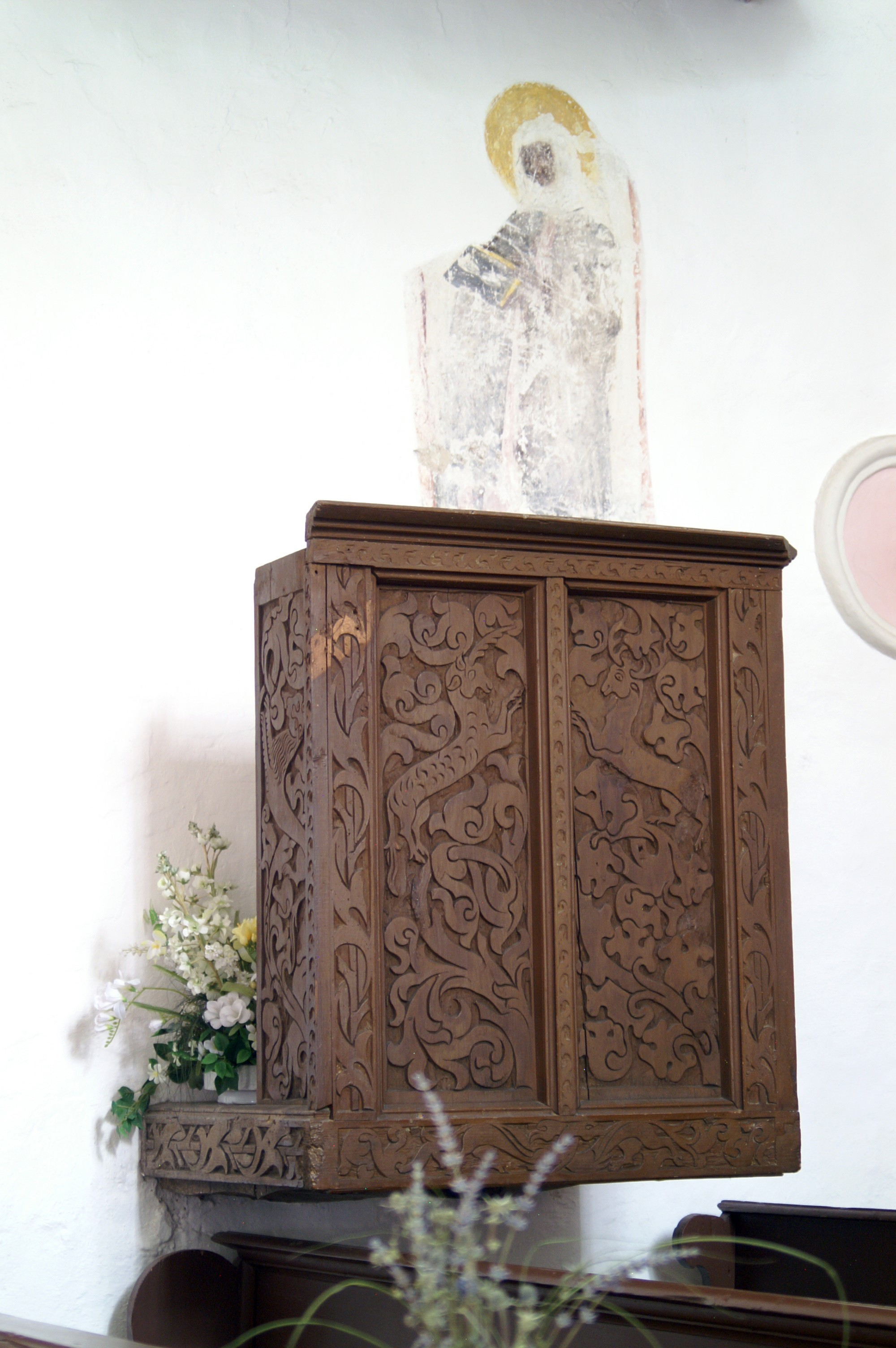 Kanzel mit historischer Bemalung